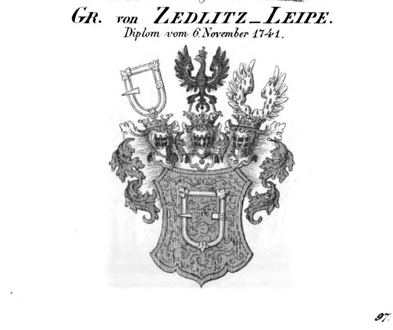 Wappen Zedlitz Leipe - Tyroff HA.jpg